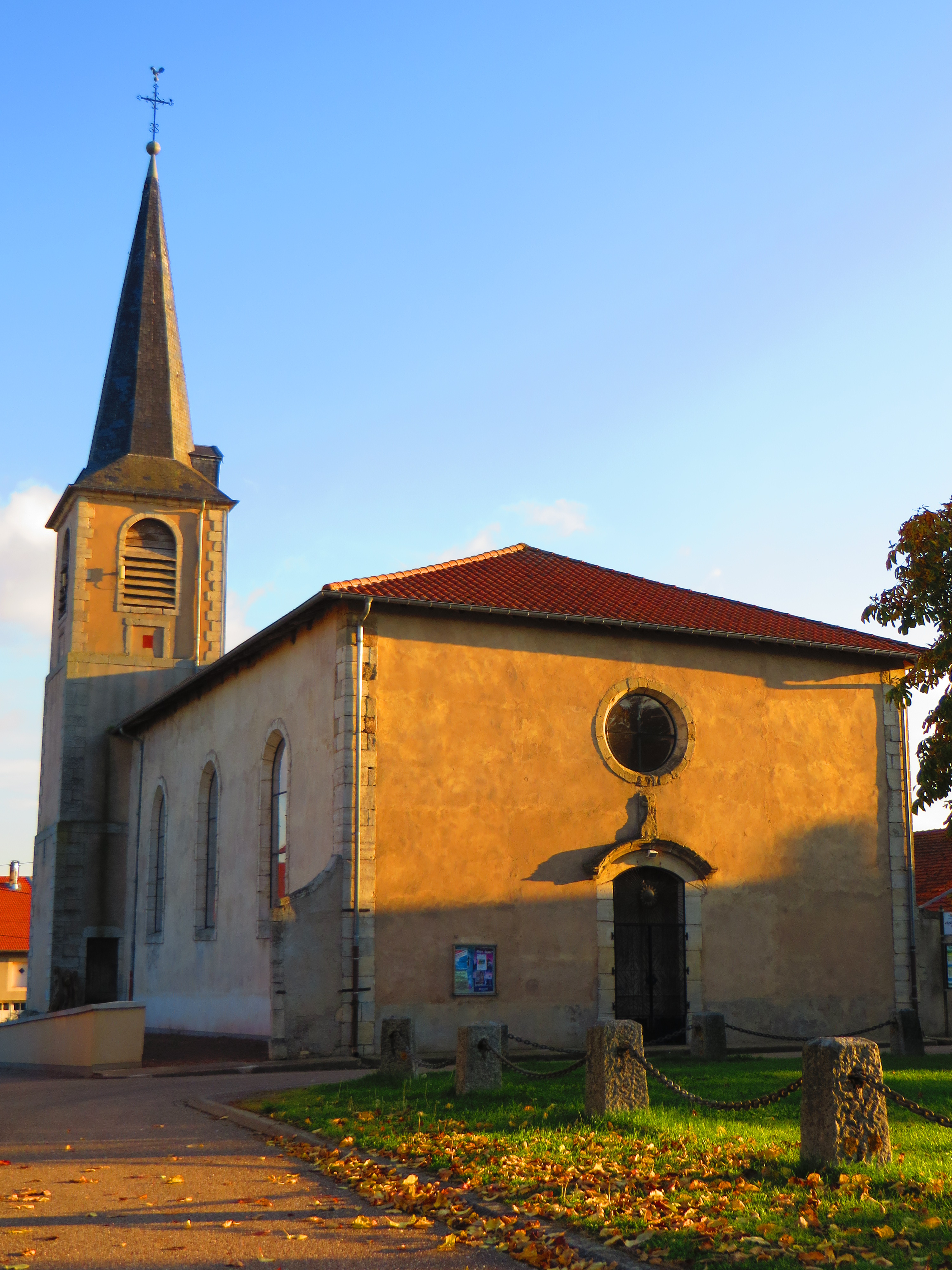 Vannecourt l'église Saint-Denis